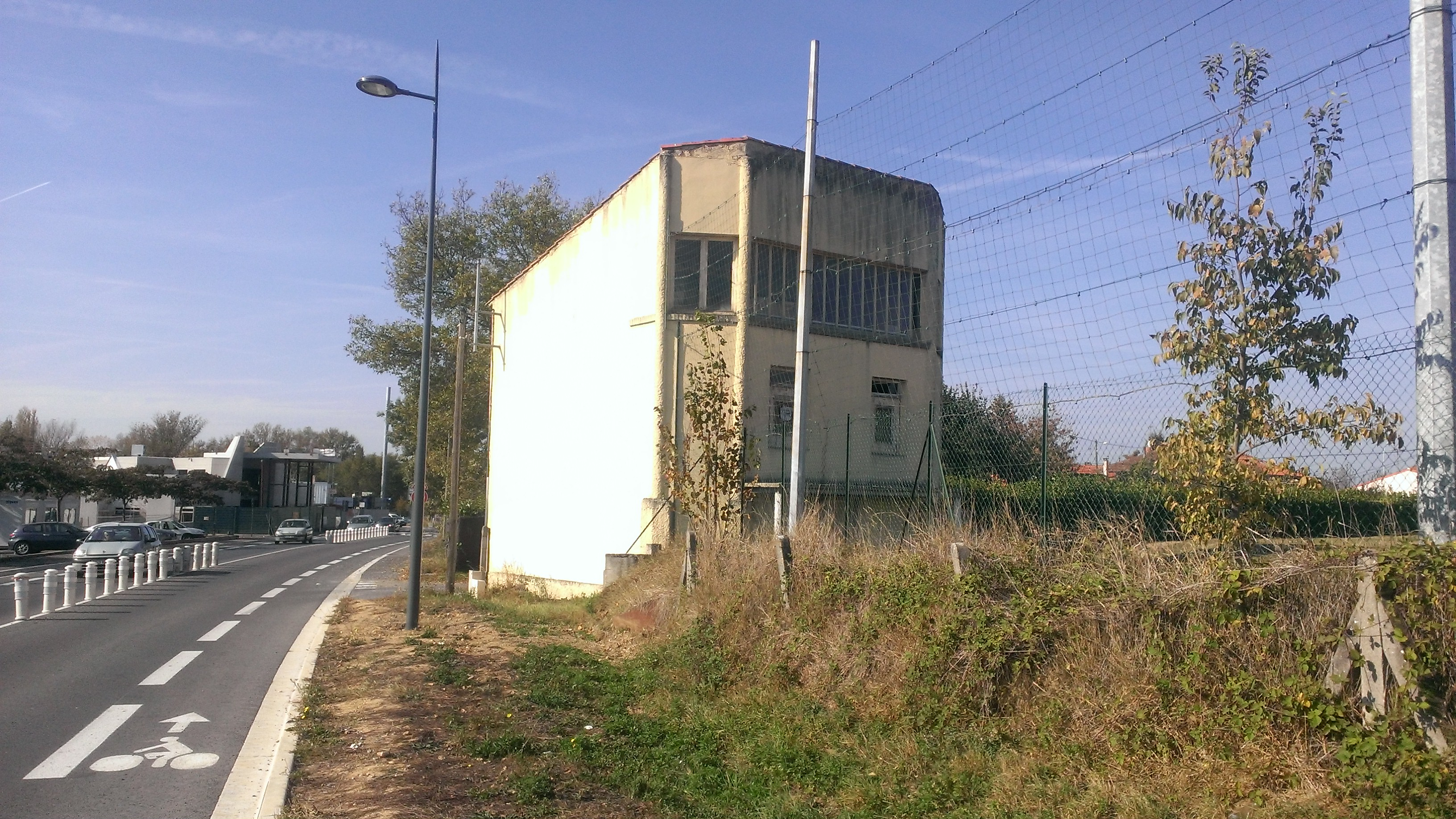 Dernier vestige des tribunes du circuit d'Albi dit "des Planques".